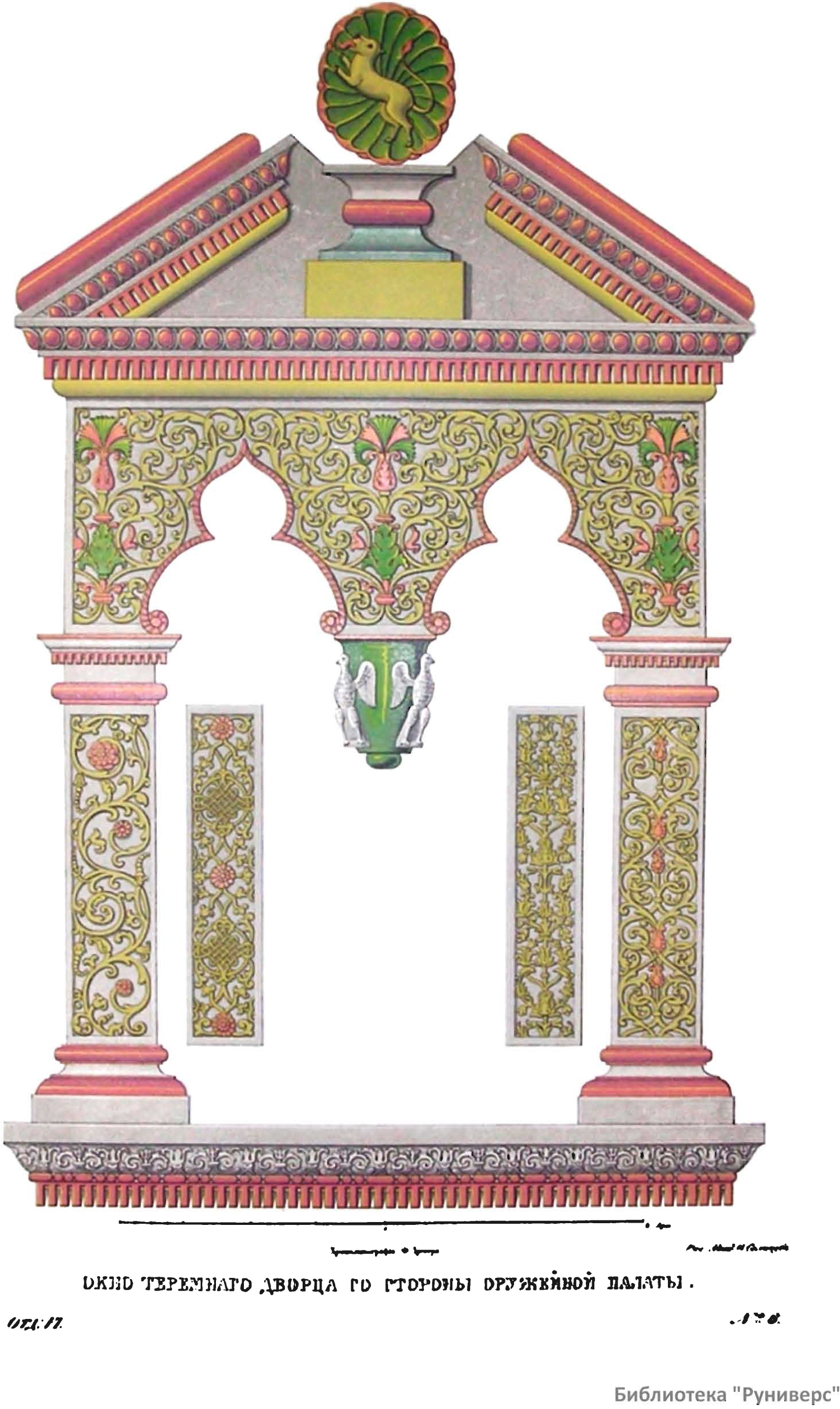 Древности Российского государства (Antiquities of Russian country), 1846—1853. Иллюстратор — Солнцев, Фёдор Григорьевич. Отделение VI. Памятники древнего русского зодчества Окна Теремного Дворца.